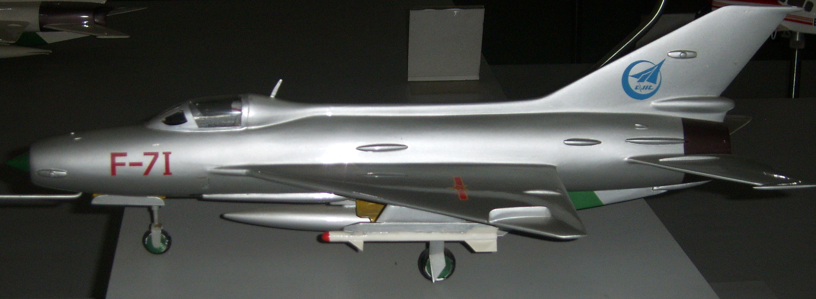 J-7I fighter 模型。拍摄于北京航空博物馆